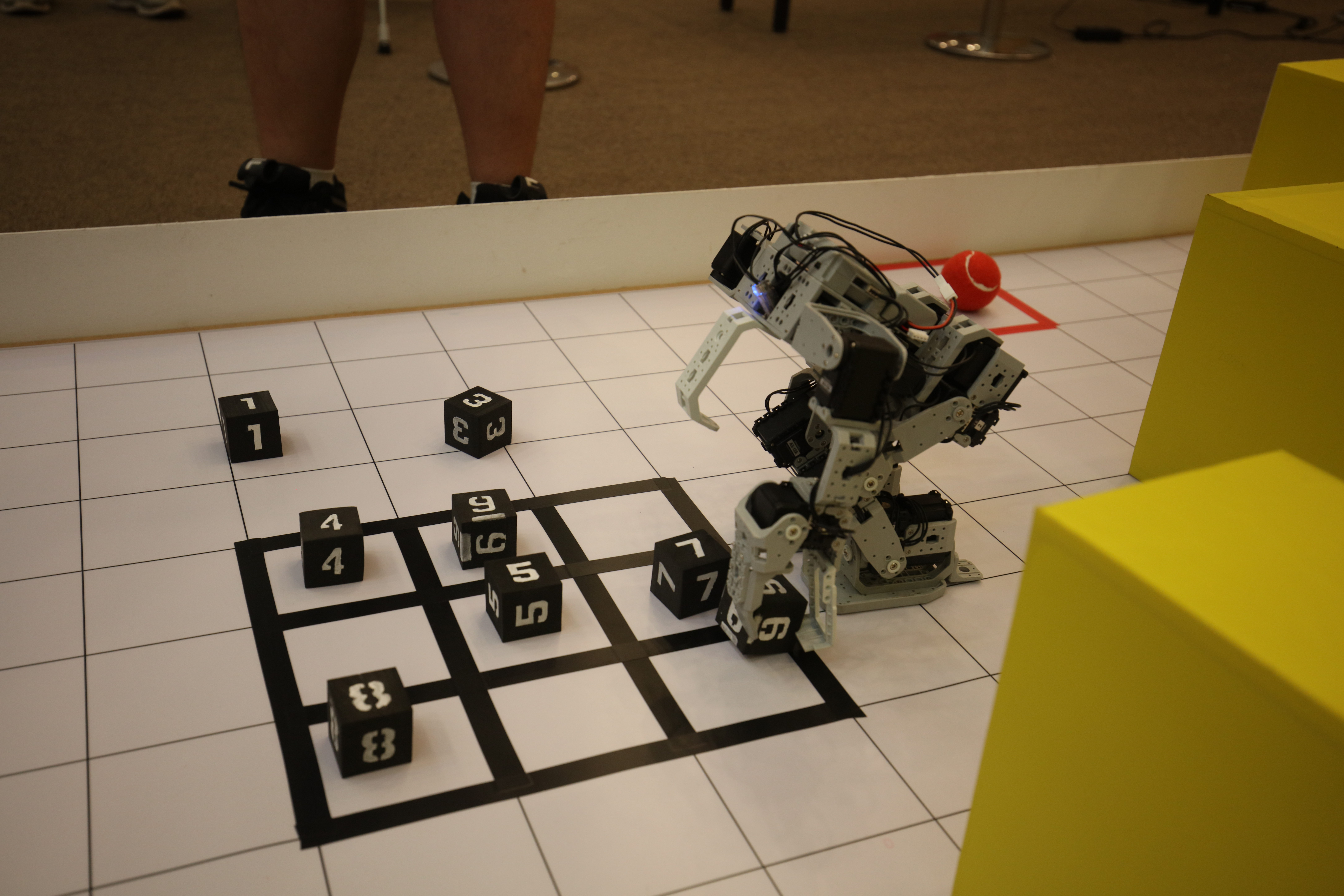 2019 대전로봇융합페스티벌 로봇경진대회2